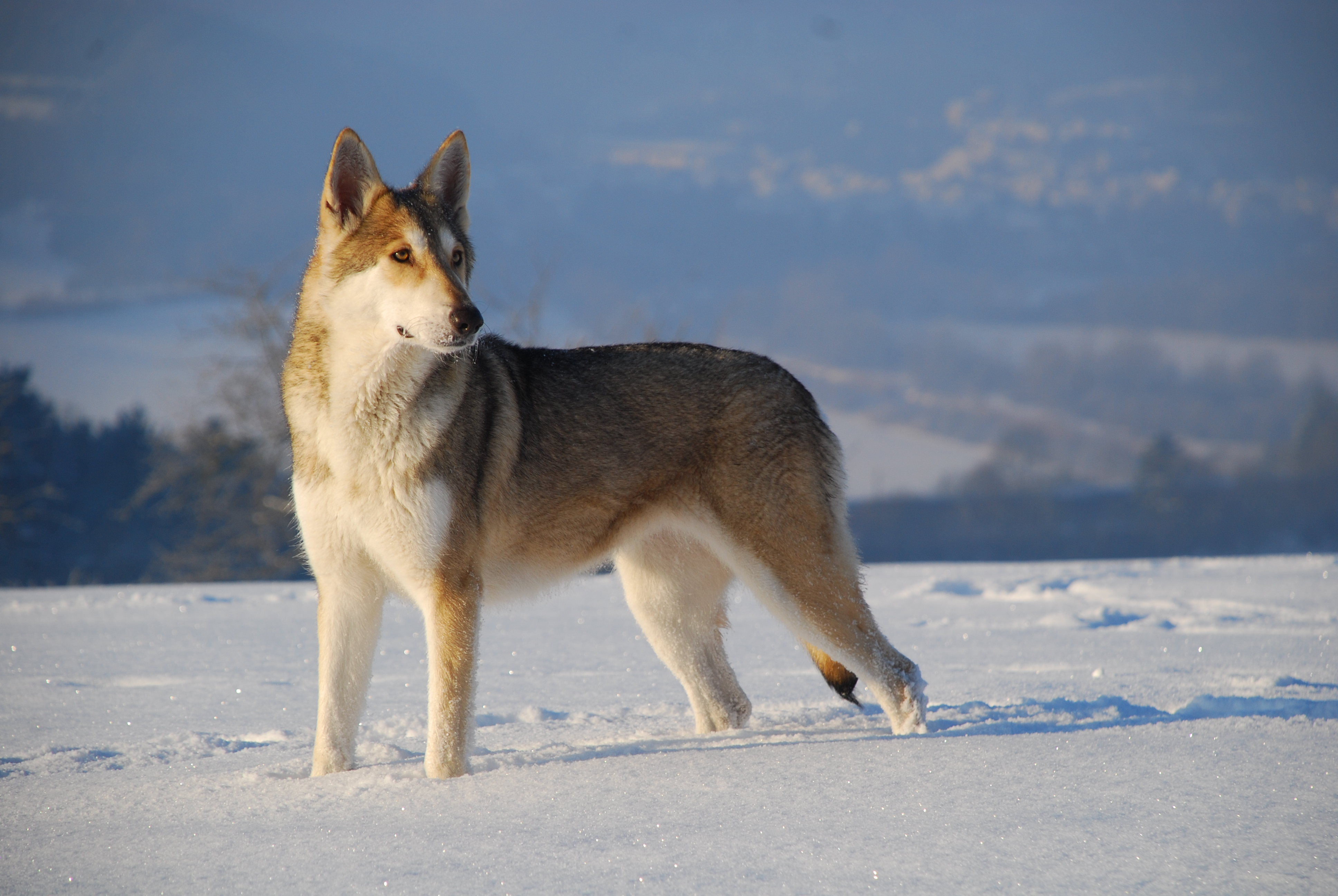 Saarlooswolfhündin aus NVSWH-Linie